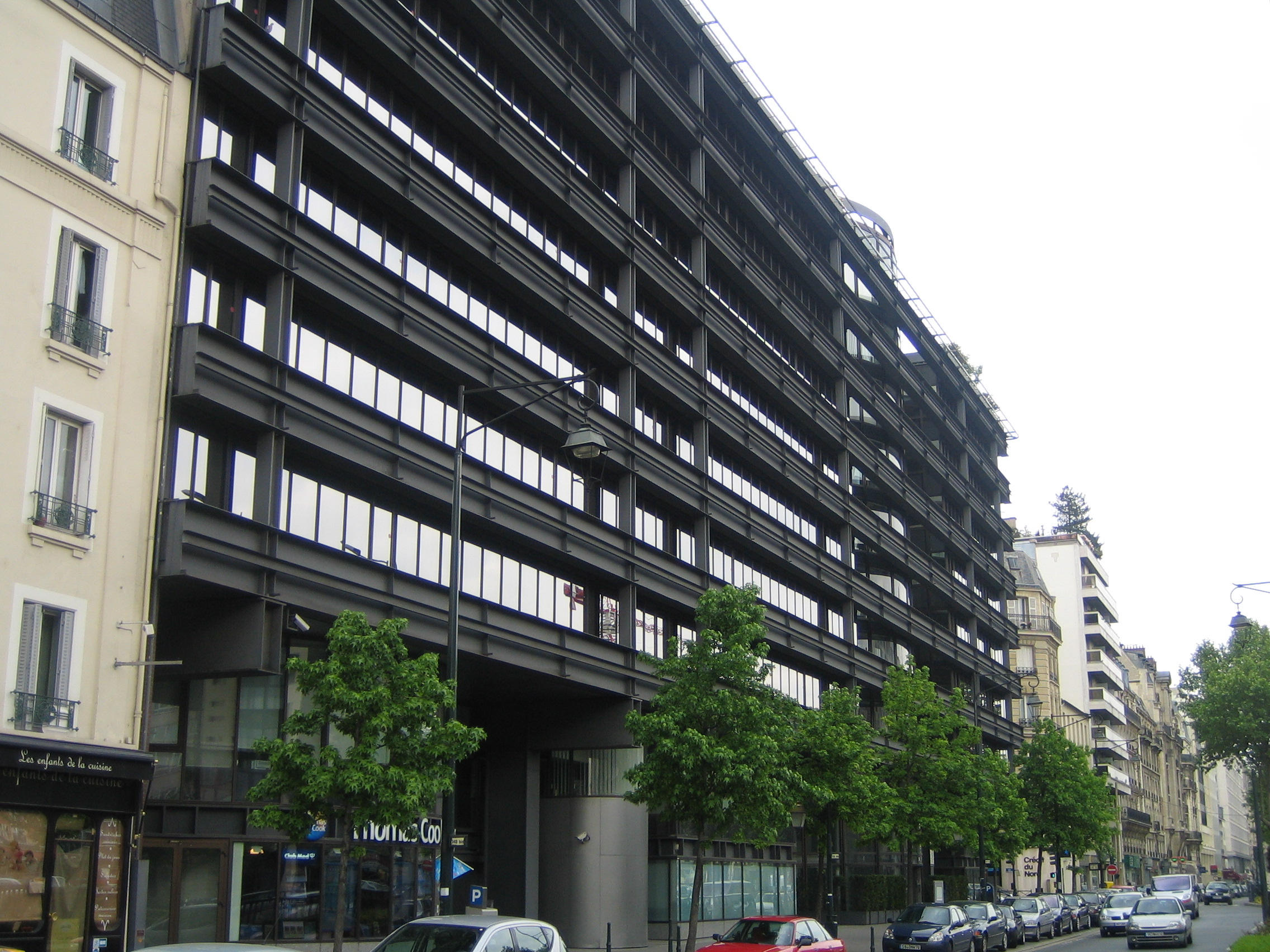 Photo prise le 14 mai 2006 à 18:00